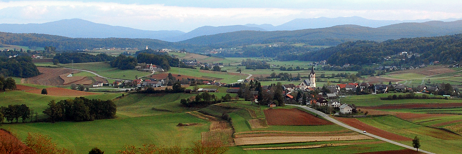 Fotografija Mirne Peči iz leta 2009.